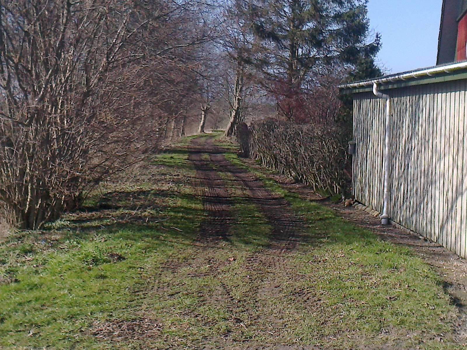 Brenderupbanens tracé NV for Kustrup Station. For enden af denne korte sti gik banen over Hovedvej 1 på en bro, der blev revet ned i 1984.